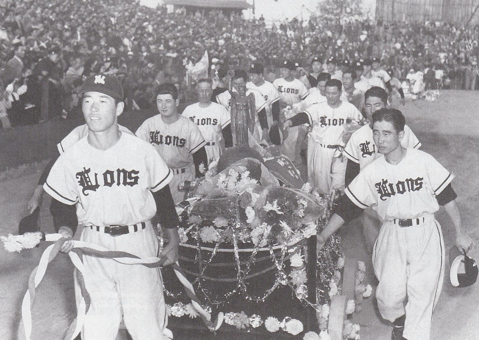 1954年、パシフィック・リーグ初優勝を遂げた西鉄ライオンズ。